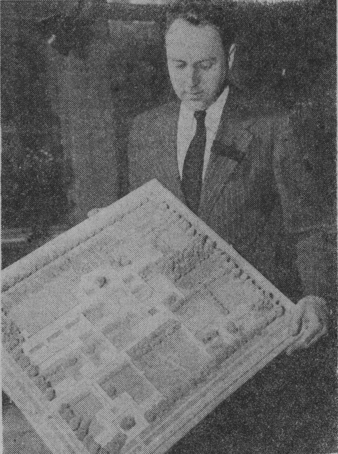 Arkitekten Yngve Tegnér med modell av tänkt legationsbyggnad i New Delhi